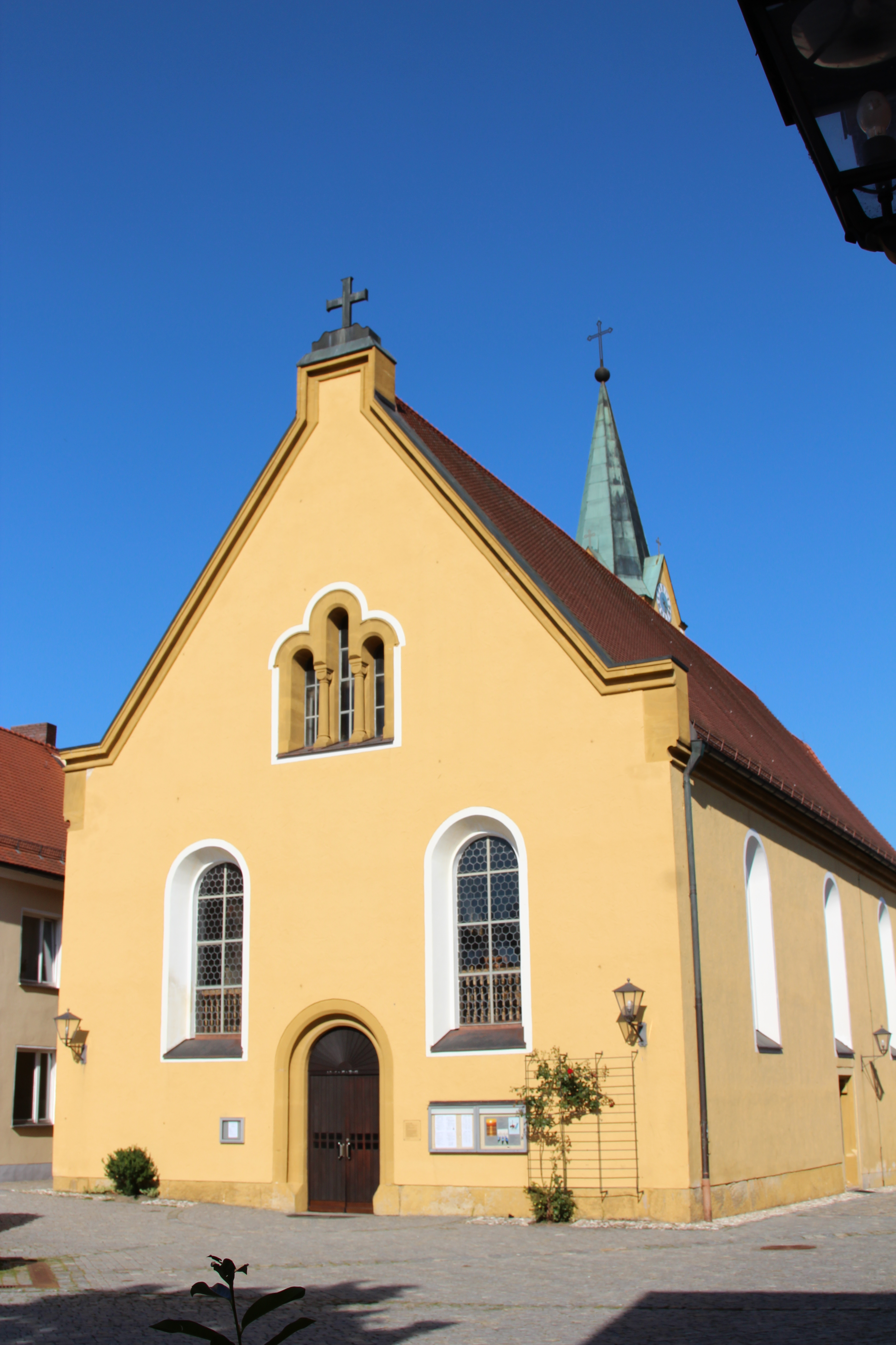 Pfarrkirche St. Ägidius, Bruck in der Oberpfalz, Landkreis Schwandorf, Oberpfalz, Bayern: Im Jahre 1140 weihte der Bamberger Bischof Egibert die katholische Pfarrkirche St. Ägidius. Die Anlage ist im Kern gotisch mit Sakristei, Ostchor und Turm. Nach der Zerstörung im 30-jährigen Krieg baute man das Langhaus und das Gewölbe neu auf. Die Inneneinrichtung ist im barocken und klassizistischen Stil ausgeführt. 1855/56 wurde das Gotteshaus nach Westen erweitert. 1889 erhöhte man den Turm auf 36m (Quelle: Hinweistafel an der Kirche)